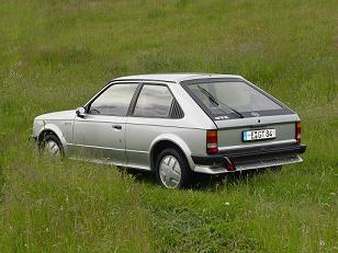 dsu Kadett d GTE